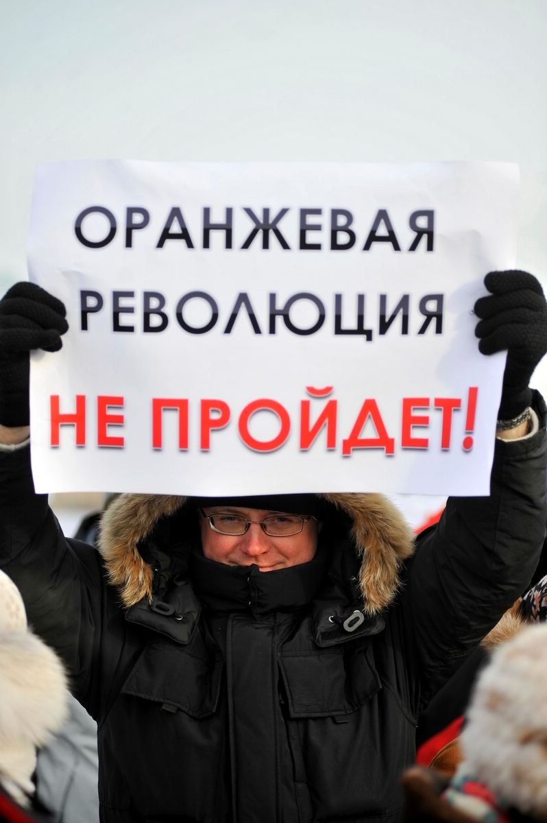 Митинг сторонников Путина на Поклонной 4 февраля 2012 года